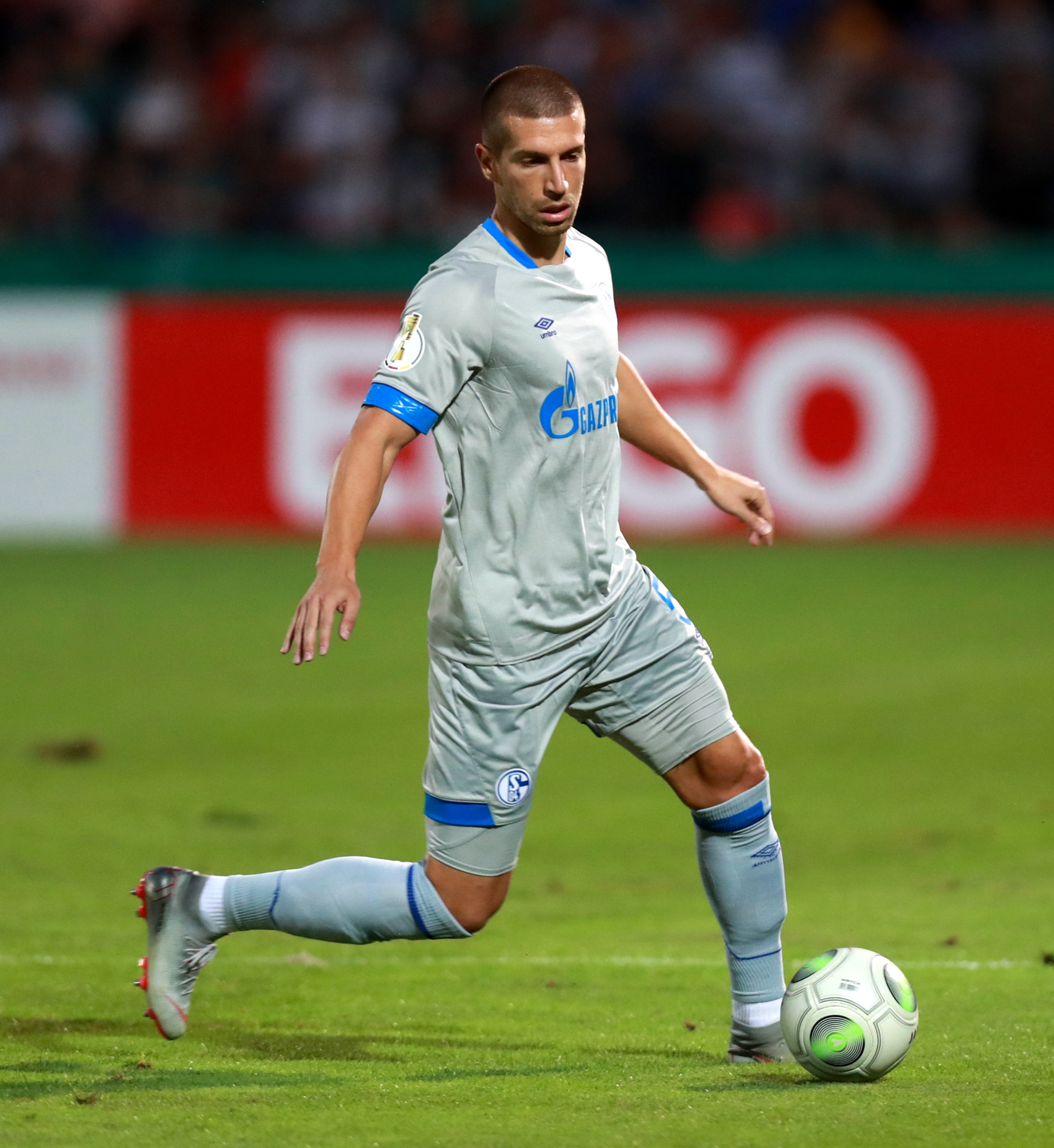 DFB-Pokal 2018/19, 1. Hauptrunde: 1. FC Schweinfurt 05 gegen FC Schalke 04 0:2 (0:1)